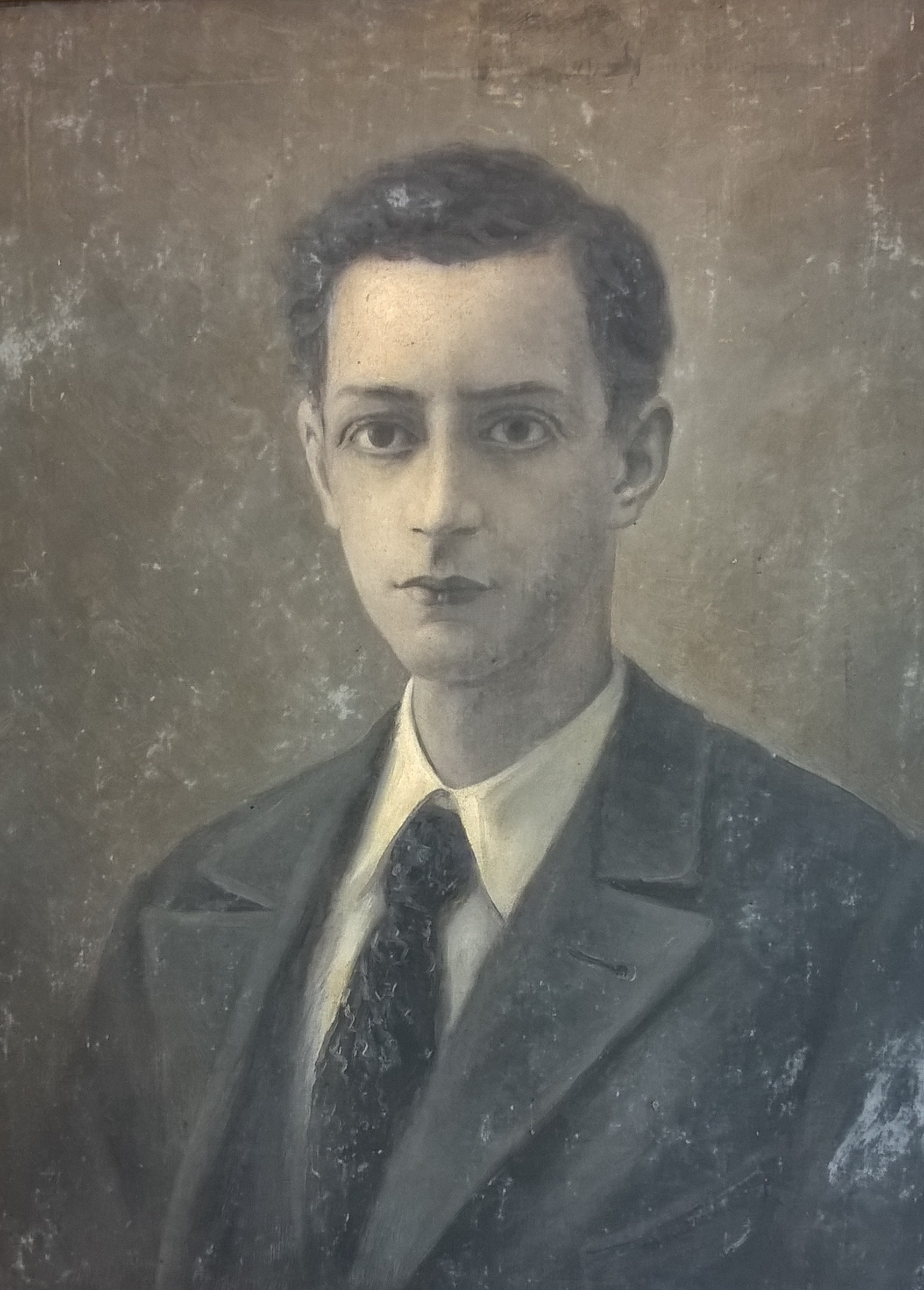 Ritratto di Sandro Italico Mussolini